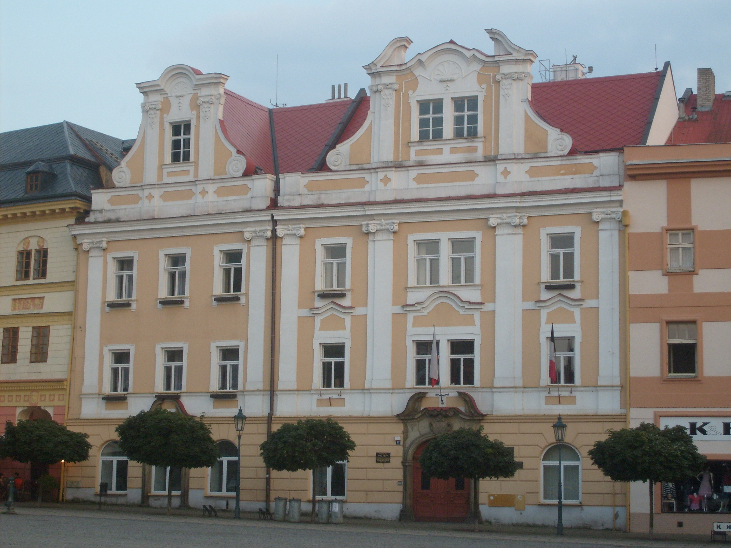 Nová radnice, Chrudim, Pardubice Region, Czech Republic